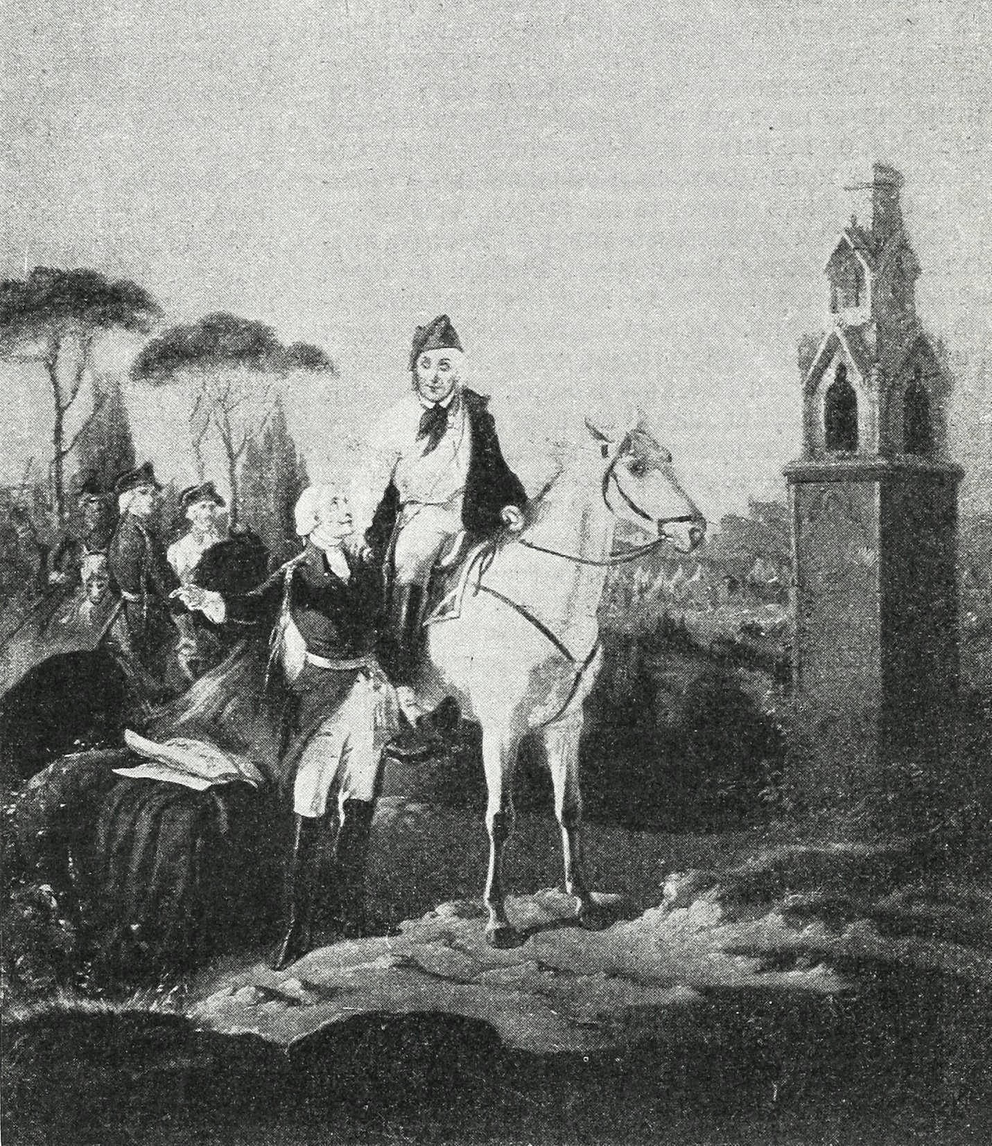 Александр Суворов в Италии в 1799 году. Это изображение было использовано для иллюстрирования статьи «Итальянский поход Суворова» опубликованной в одиннадцатом томе «Военной энциклопедии», который был издан книгоиздательским товариществом И. Д. Сытина в 1913 году в столице Российской империи городе Санкт-Петербурге.